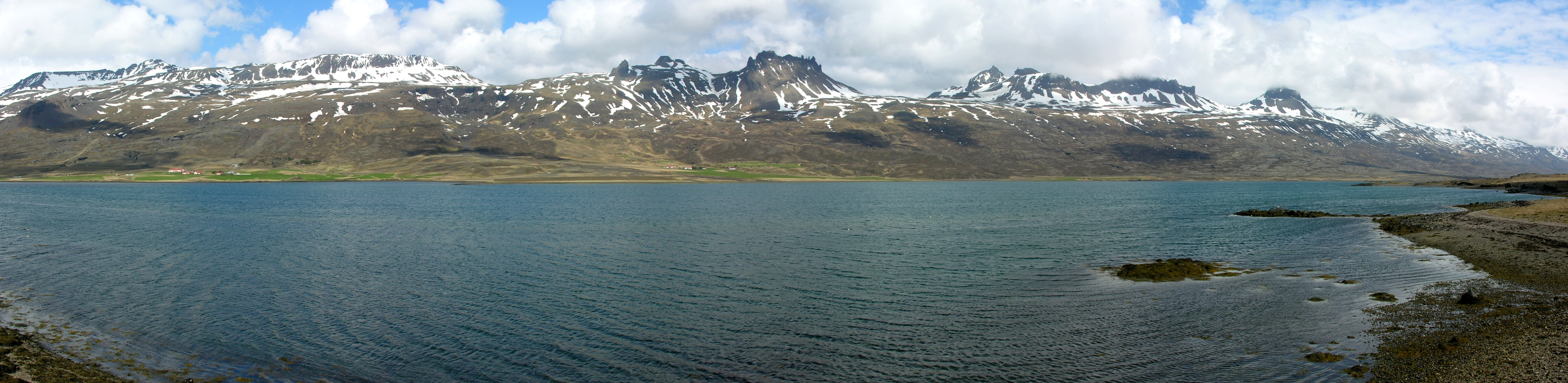 Berufjörður opposite Hvannabrekka